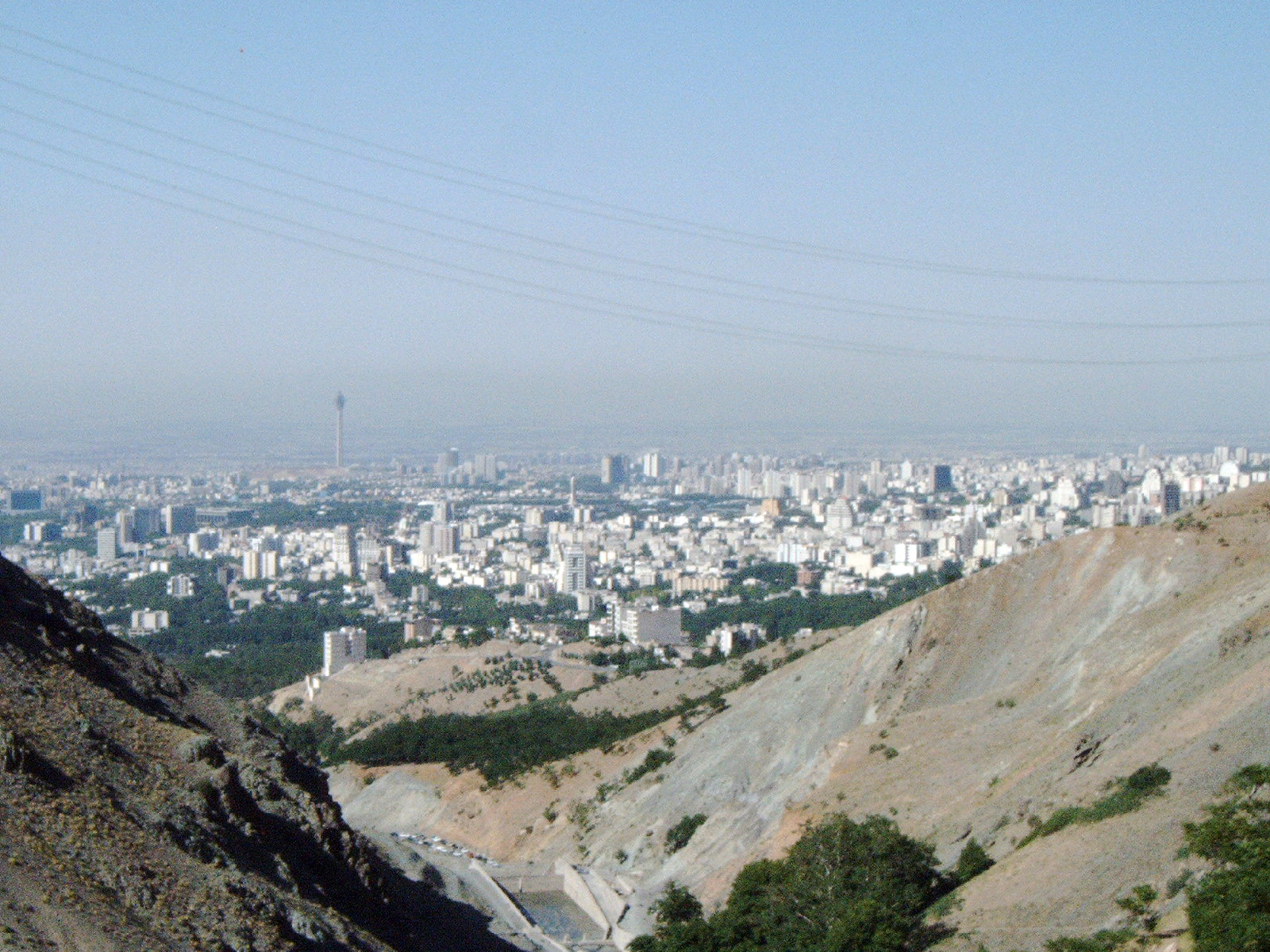 Teheran von Norden, 2006 Tehran from north, 2006